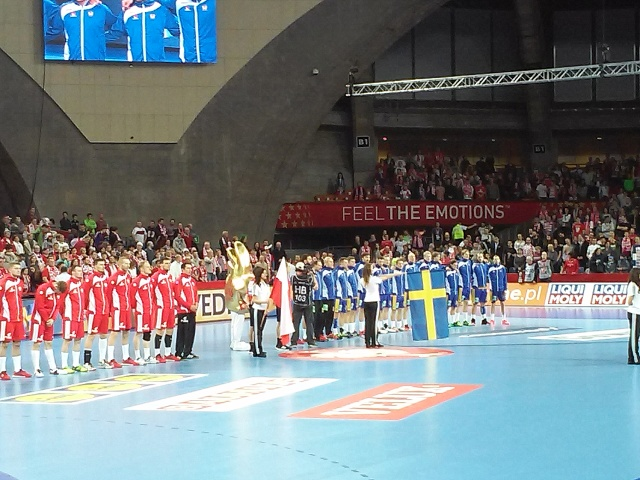 Mistrzostwa Europy w Piłce Ręcznej Mężczyzn 2016, Wrocław, mecz o 7 miejsce: Polska-Szwecja